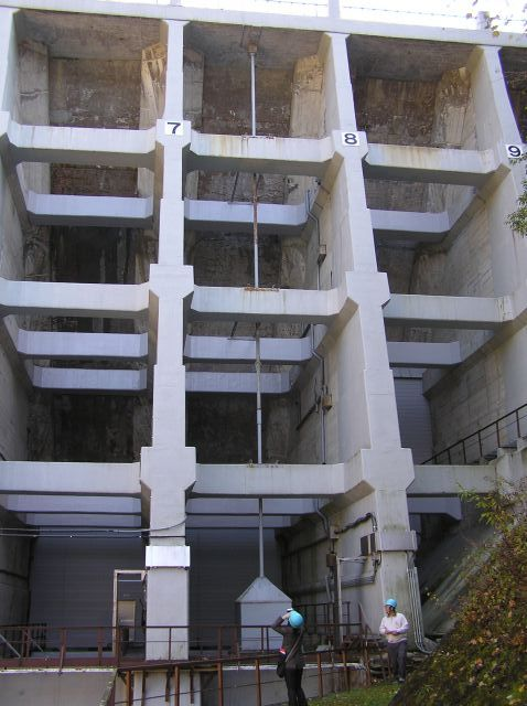 丸沼ダムの写真。ホームページダム好きドットコム掲載写真。 撮影者本人がwikiにアップロードしたもの。